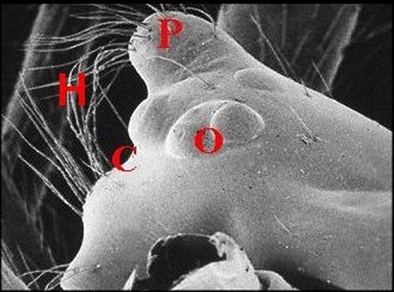 Prosoma d' Argyrodes cognatus au microscope à balayage